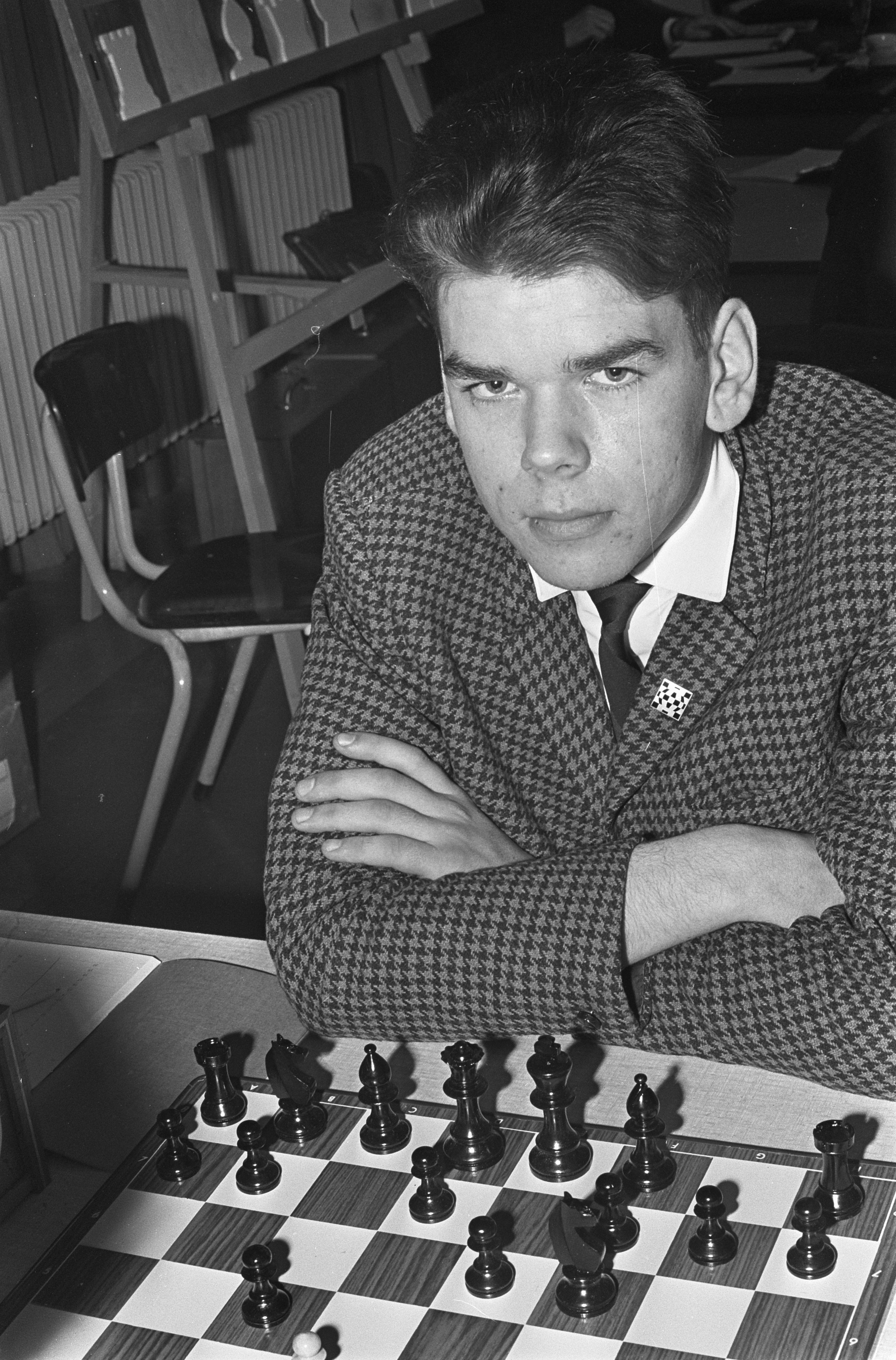 Collectie / Archief : Fotocollectie Anefo Reportage / Serie : [ onbekend ] Beschrijving : Zesde Niemeyer Jeugdschaaktoernooi te Groningen. Nummer 17 Richard Meulders (Belgie), nummer 18 Gert Ligterink , Datum : 27 december 1967 Locatie : België, Groningen, Polen Trefwoorden : Schaken Fotograaf : Nijs, Jac. de / Anefo Auteursrechthebbende : Nationaal Archief Materiaalsoort : Negatief (zwart/wit) Nummer archiefinventaris : bekijk toegang 2.24.01.05 Bestanddeelnummer : 920-9515